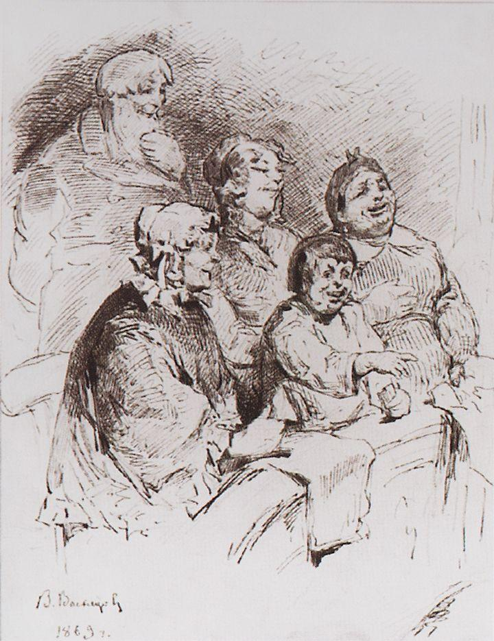 Купеческое семейство в театре